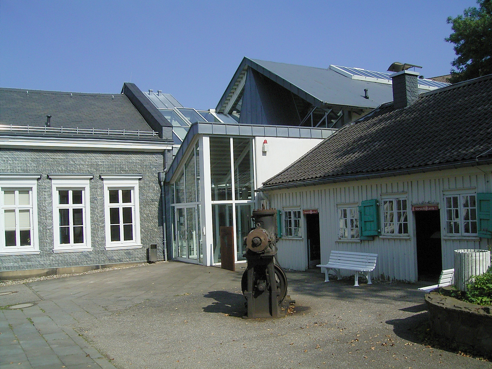 Deutsches Werkzeugmuseum in Remscheid / German tool museum in Remscheid, Germany